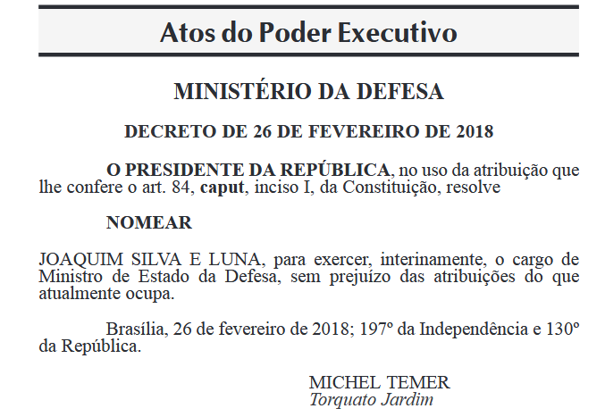 Decreto presidencial que nomeia Joaquim Silva e Luna Ministro de Estado da Defesa.